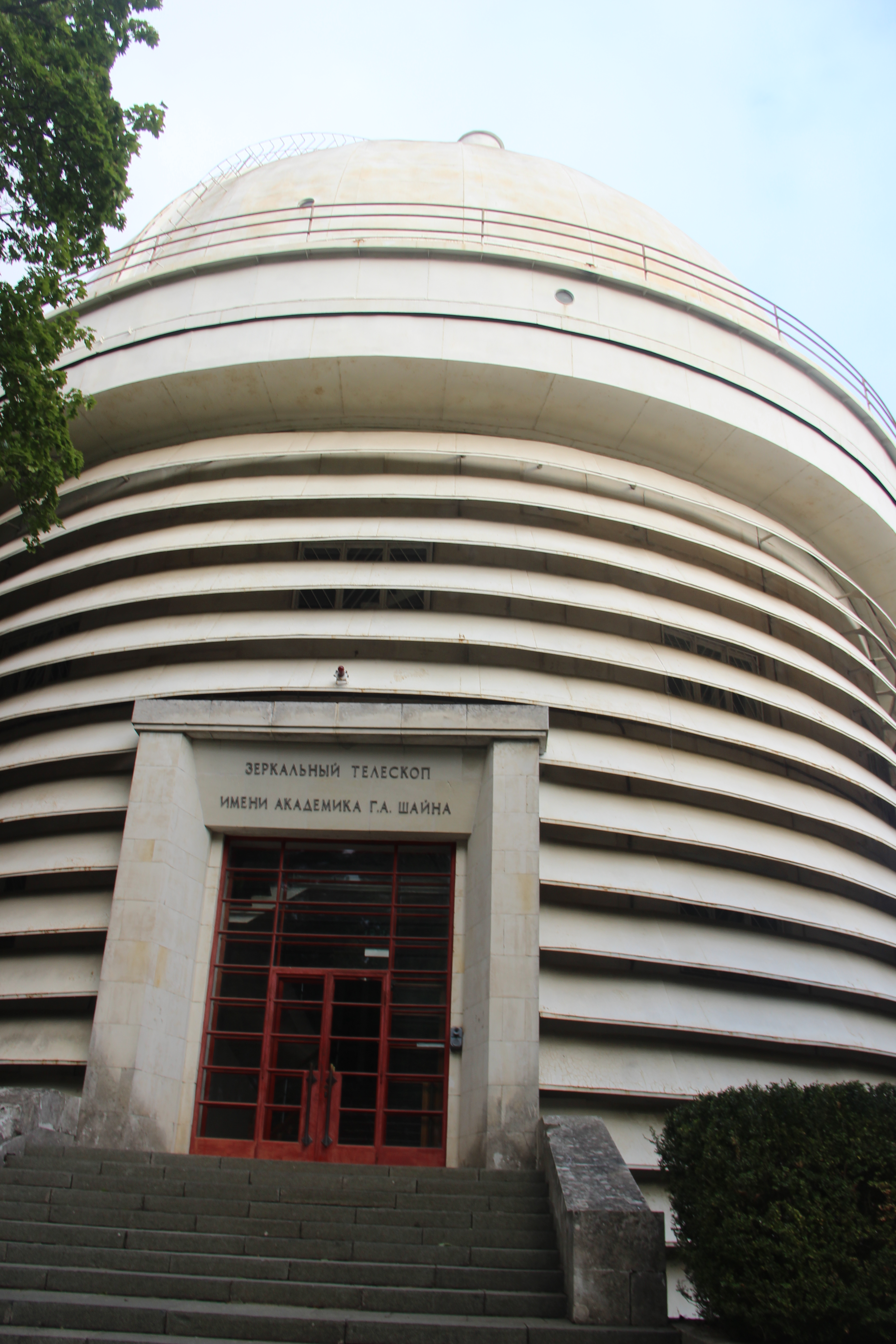 2,6-метровый зеркальный телескоп имени академика Г.А. Шайна. Крымская астрофизическая обсерватория. Научный. Бахчисарайский р-н. Крым. Россия. Сентябрь 2014